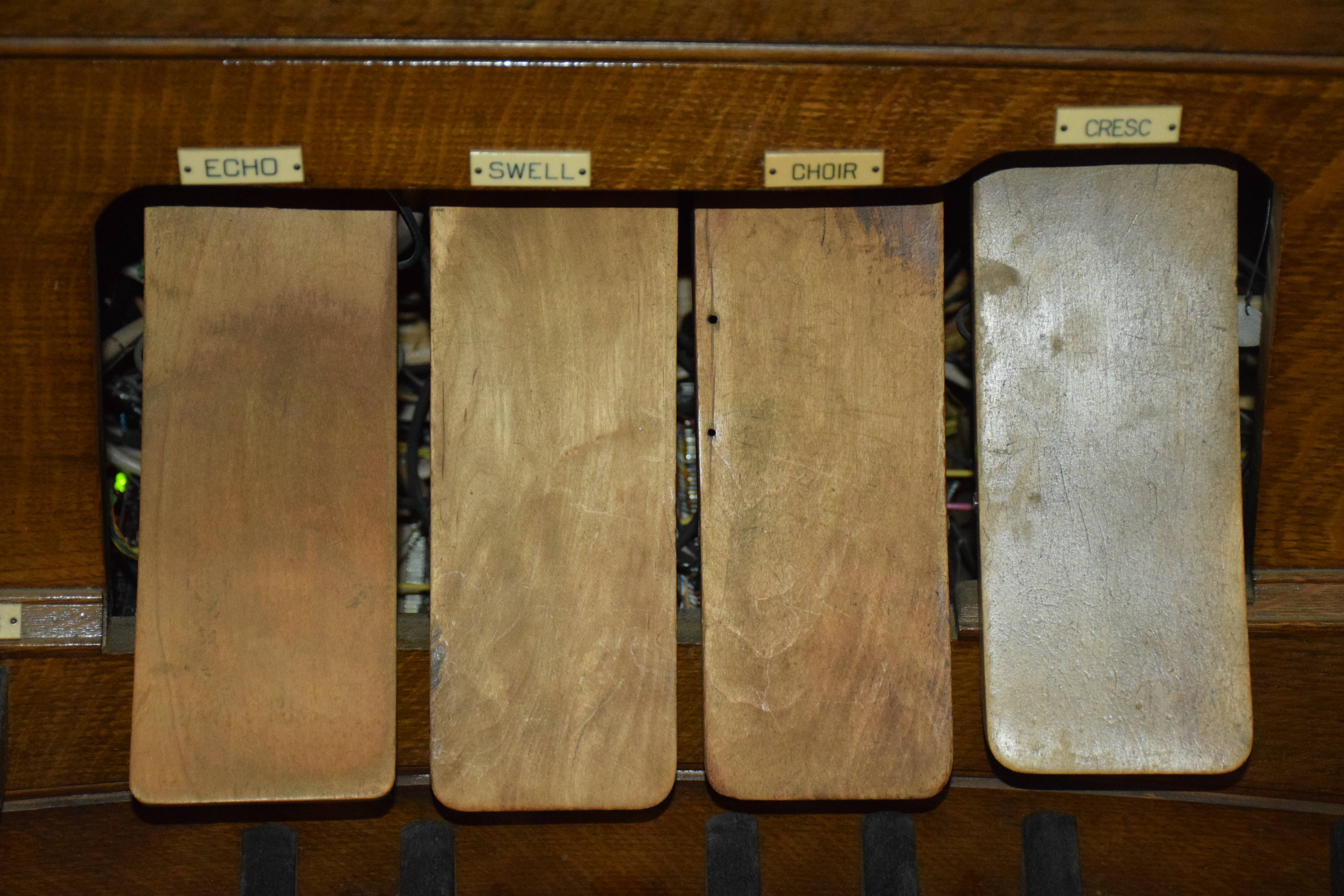 Organ